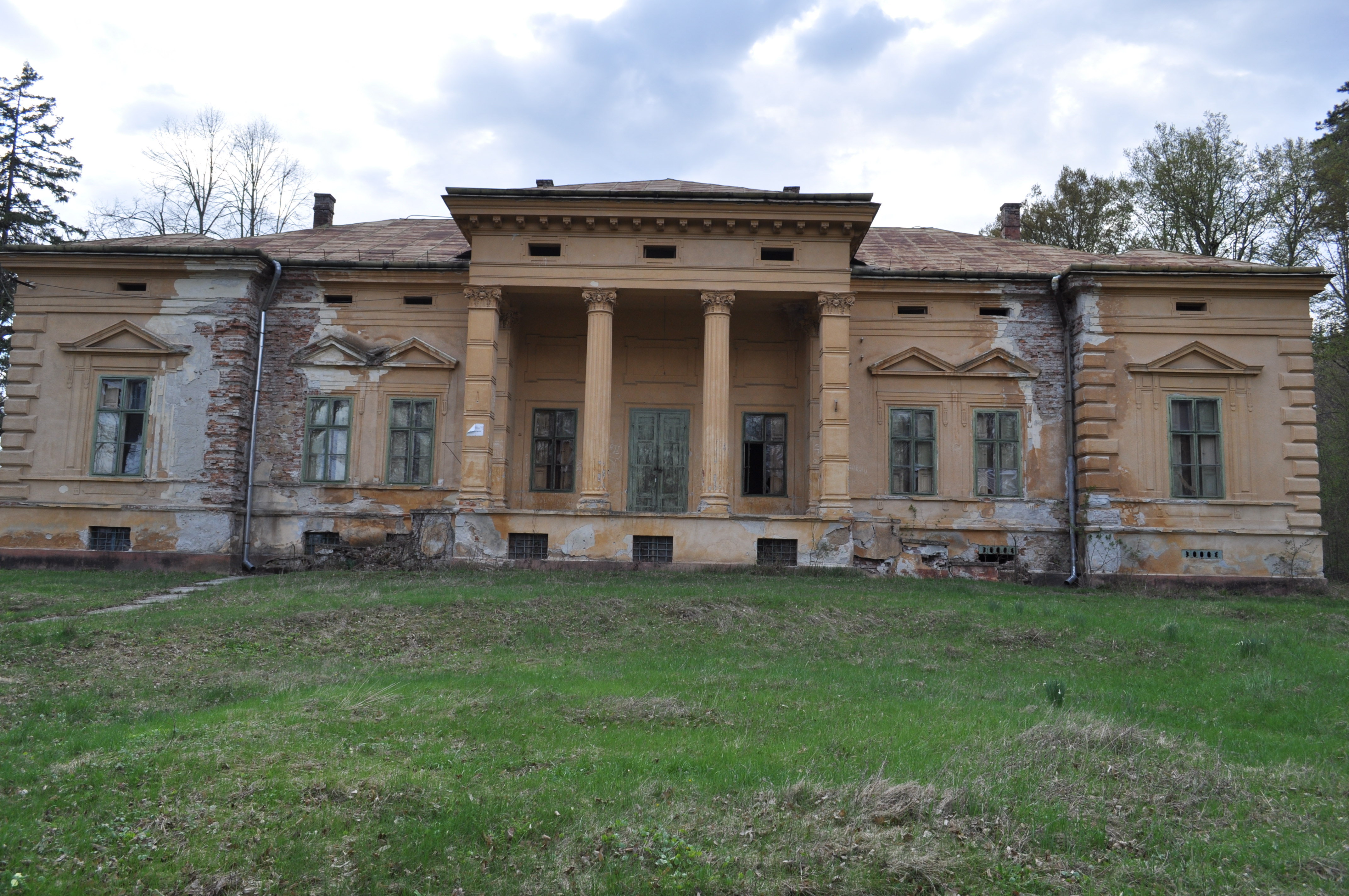 Castelul Konopi, sat ODVOŞ; comuna CONOP 01